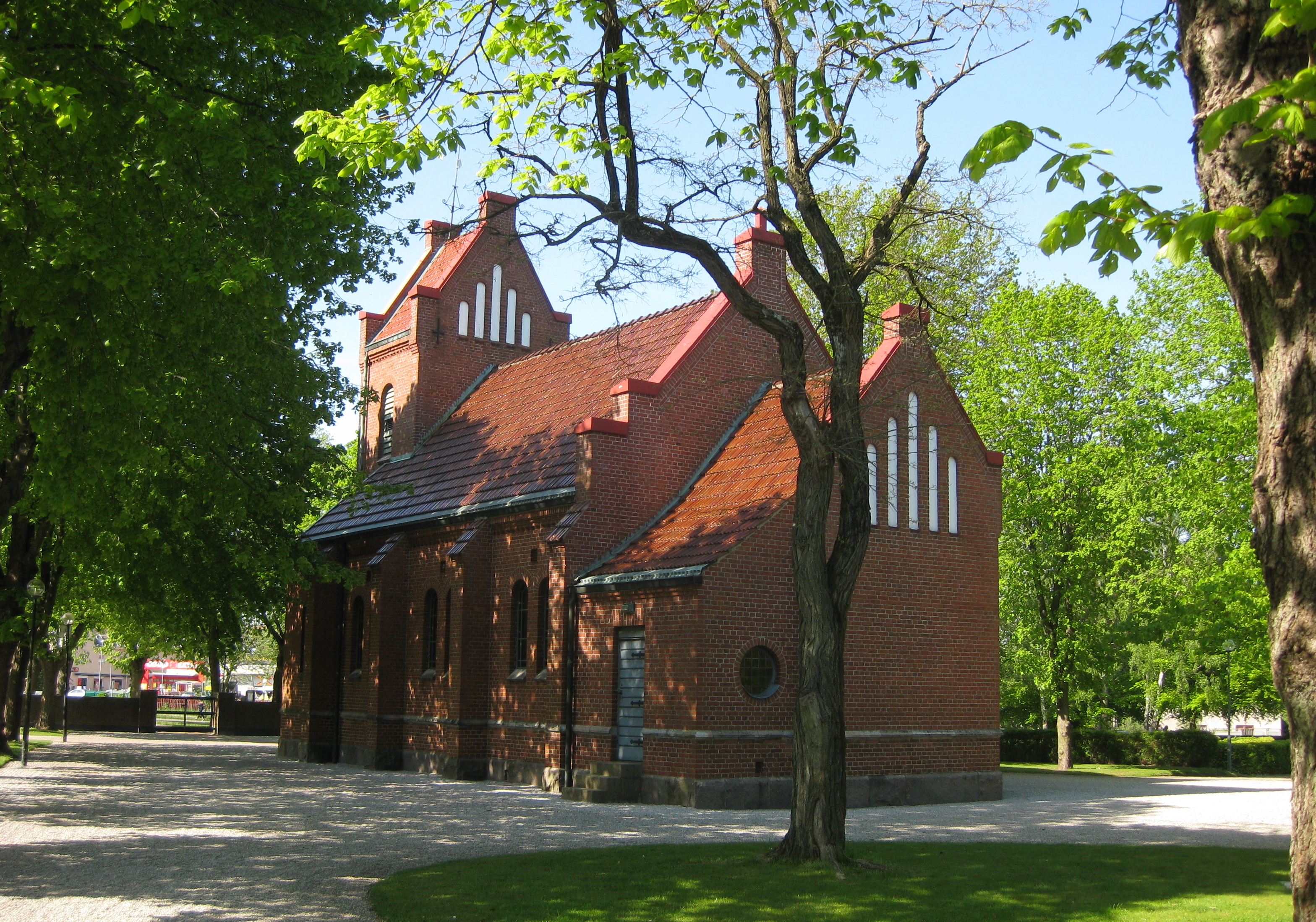 Tomelilla kyrka i maj 2012